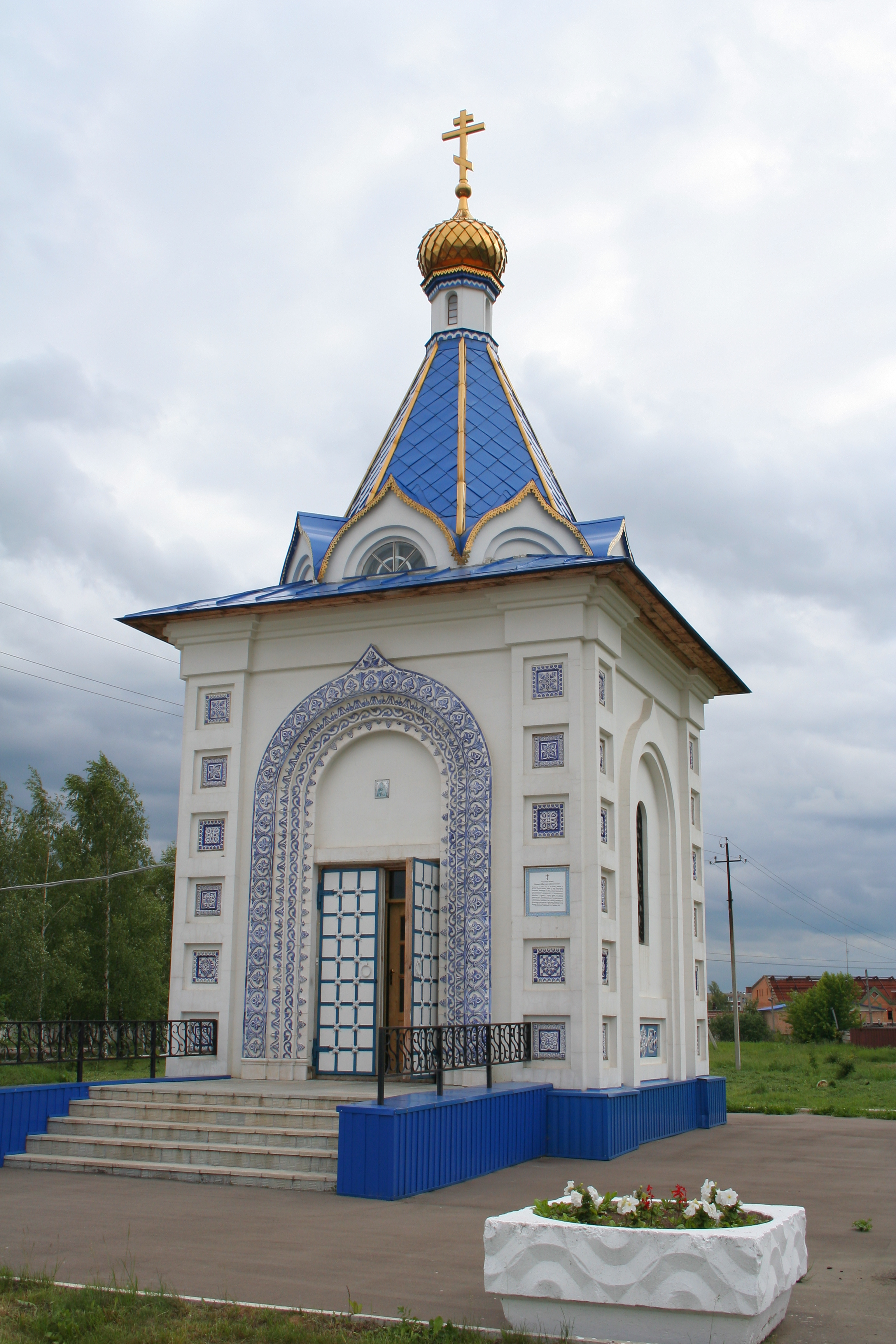 Kapelle der Gottesmutter-Ikone «Erziehung» im Kreis Gschel, Oblast Moskau, Russland.